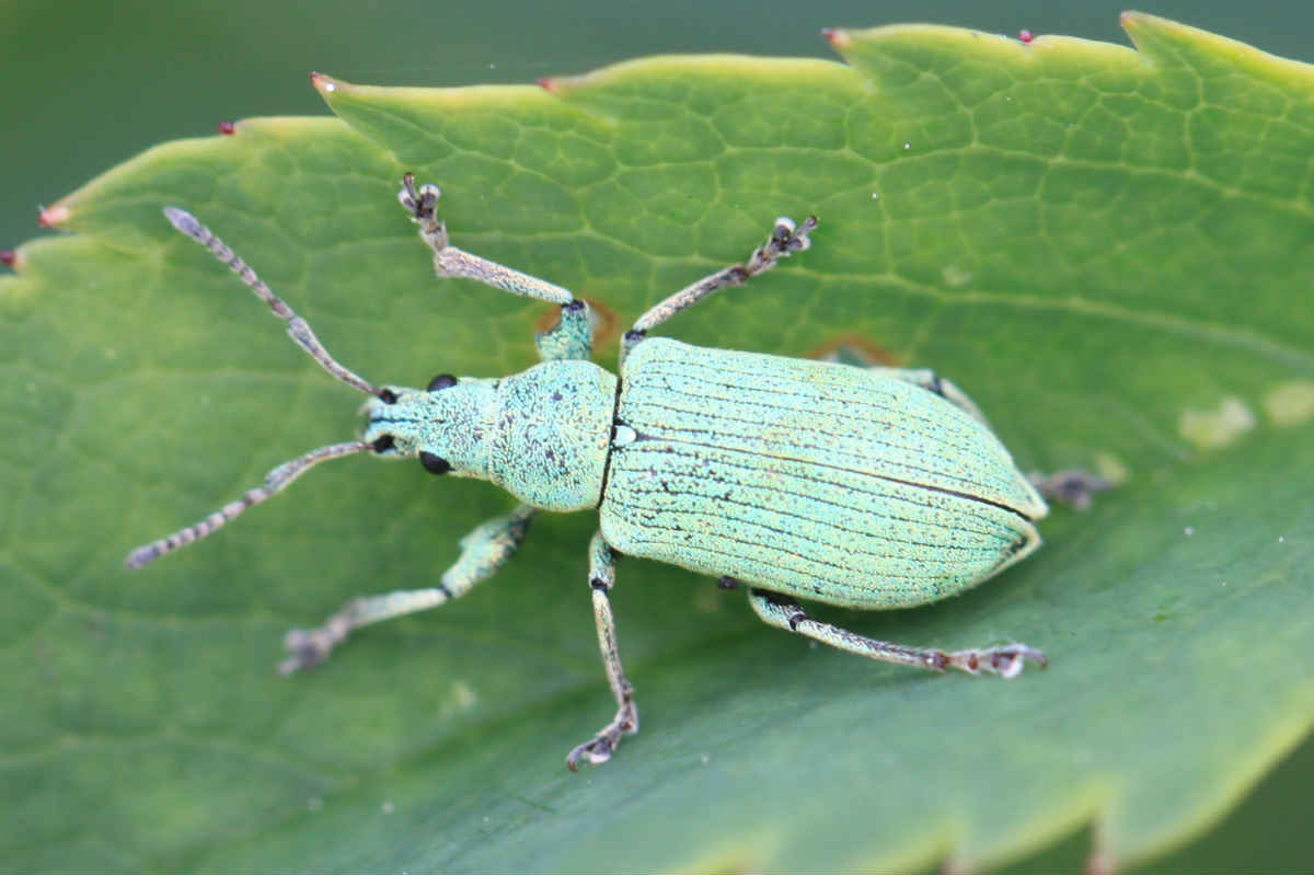 Phyllobius maculicornis am 3.5.2017 in Walldorf/Baden